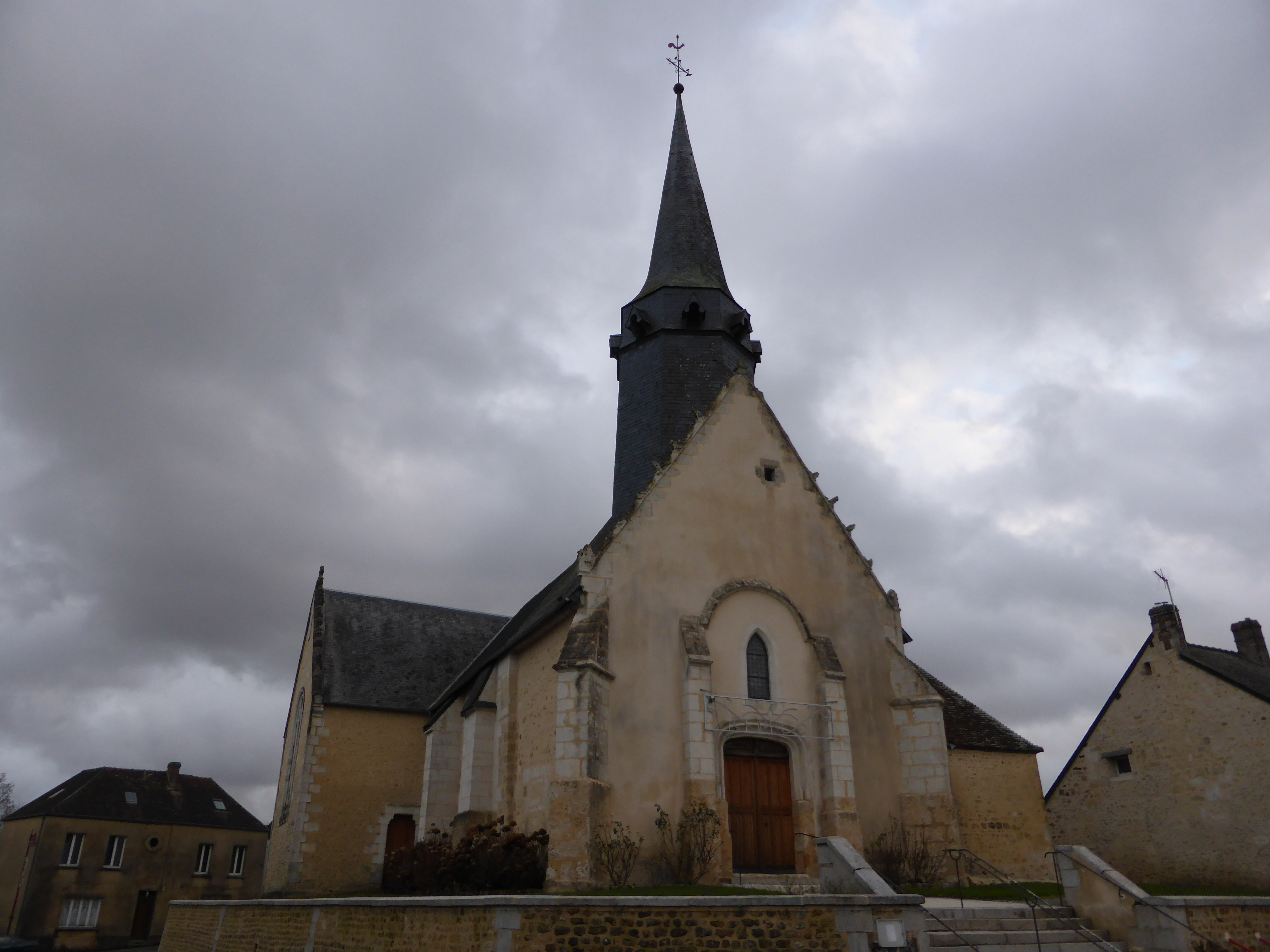 Église Saint-Pierre de Coulimer, dans l'Orne.